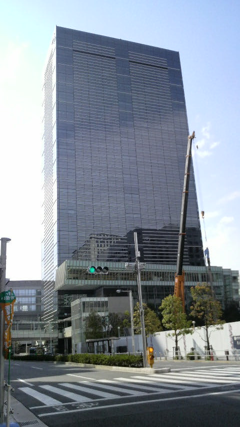 日本の港区の超高層ビルアレア品川ビル NTTファシリティーズ設計 NTTデータ NTTドコモなどが入居している東京都 港区